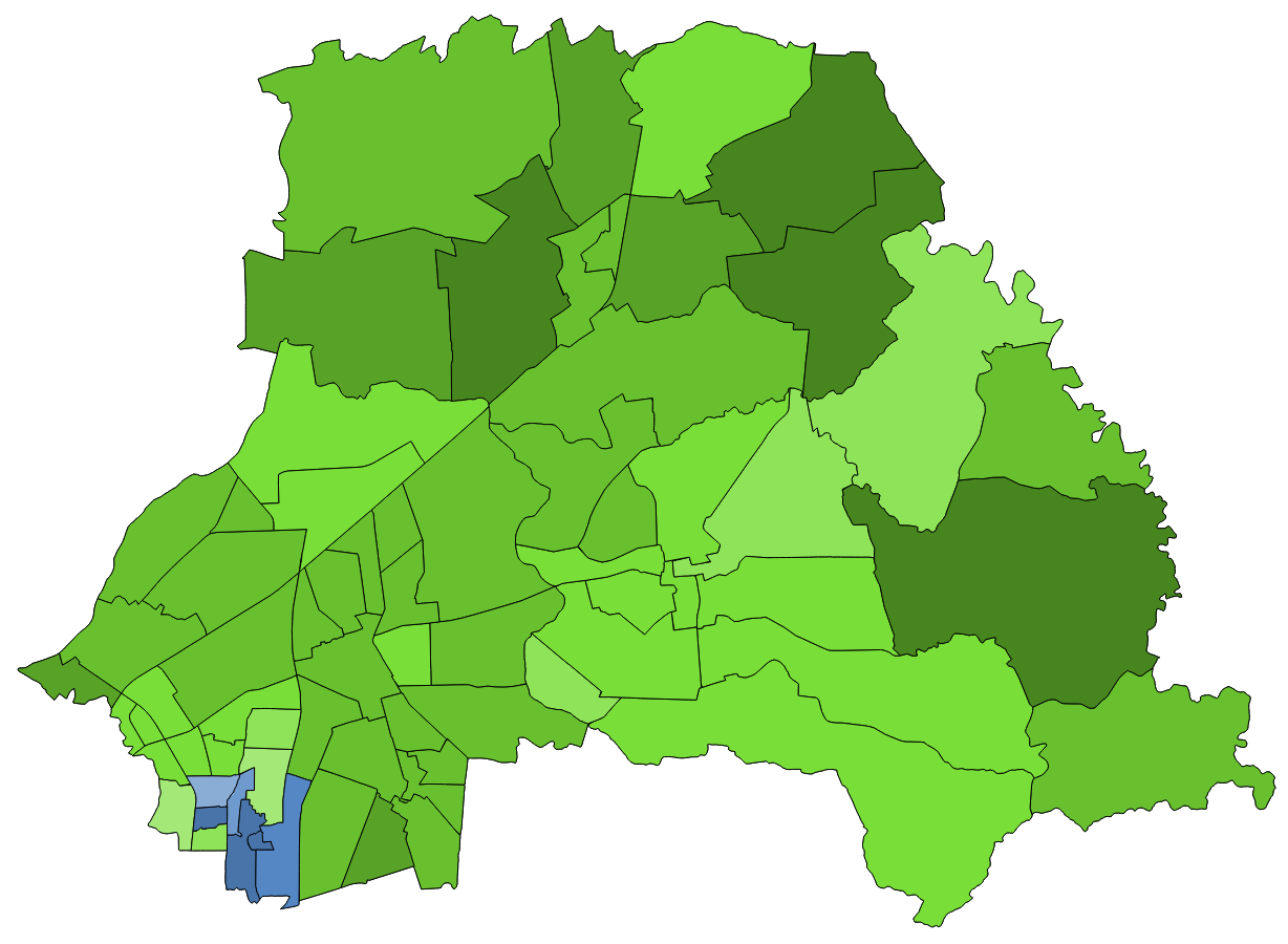 顏色對照表